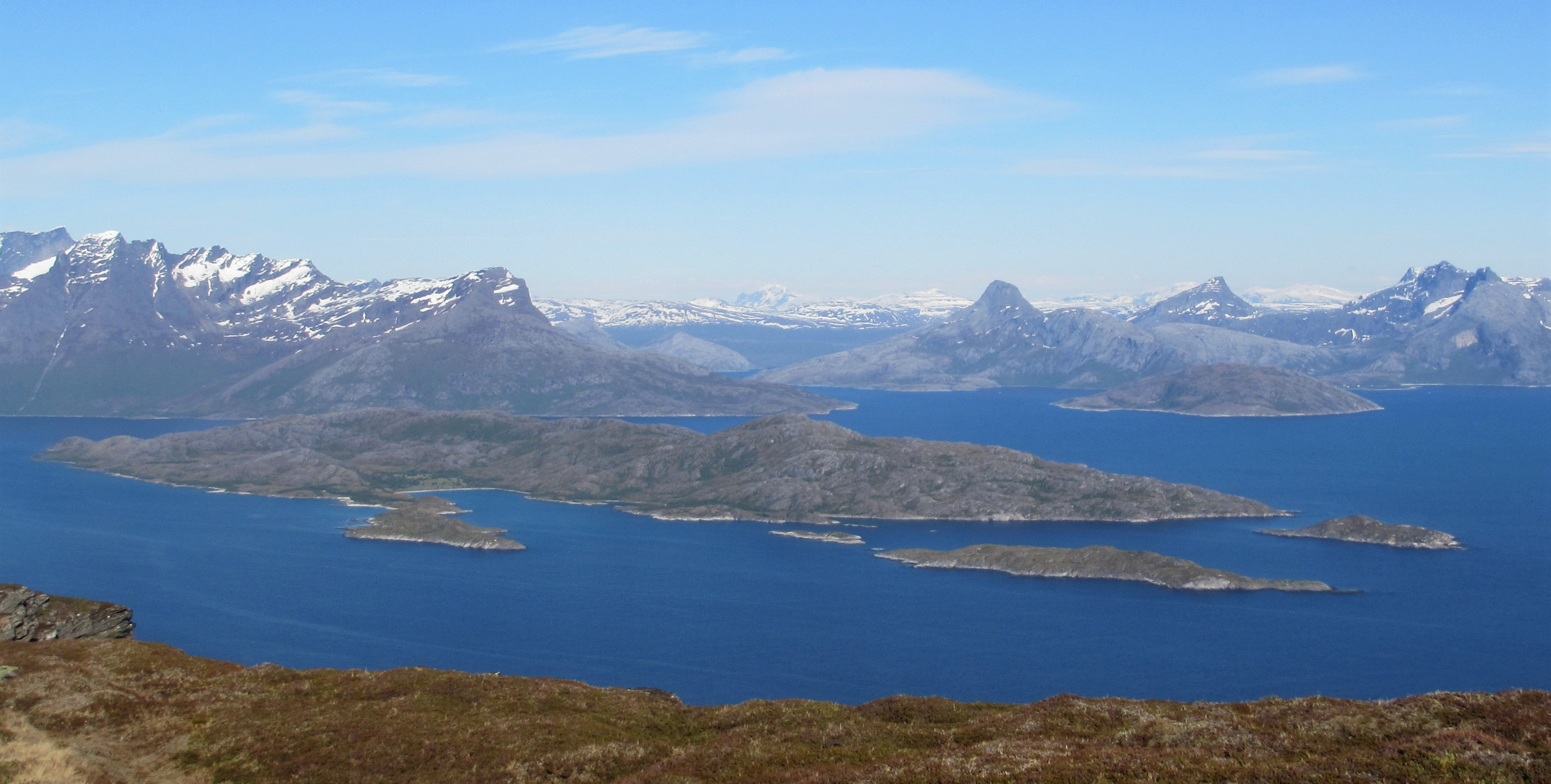 Hjartøya sett fra Brennsundfjellet